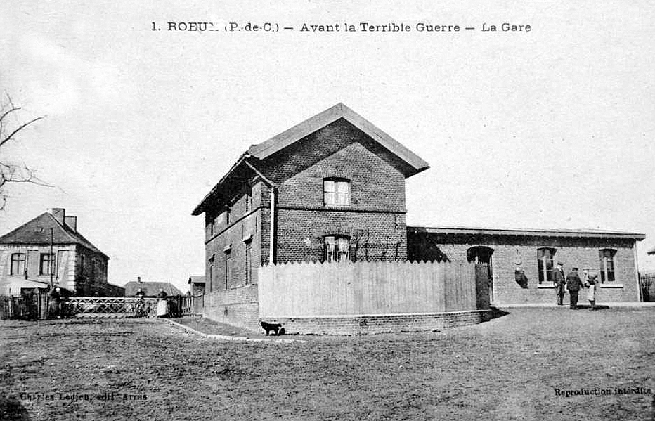 La gare dans les années 1900.